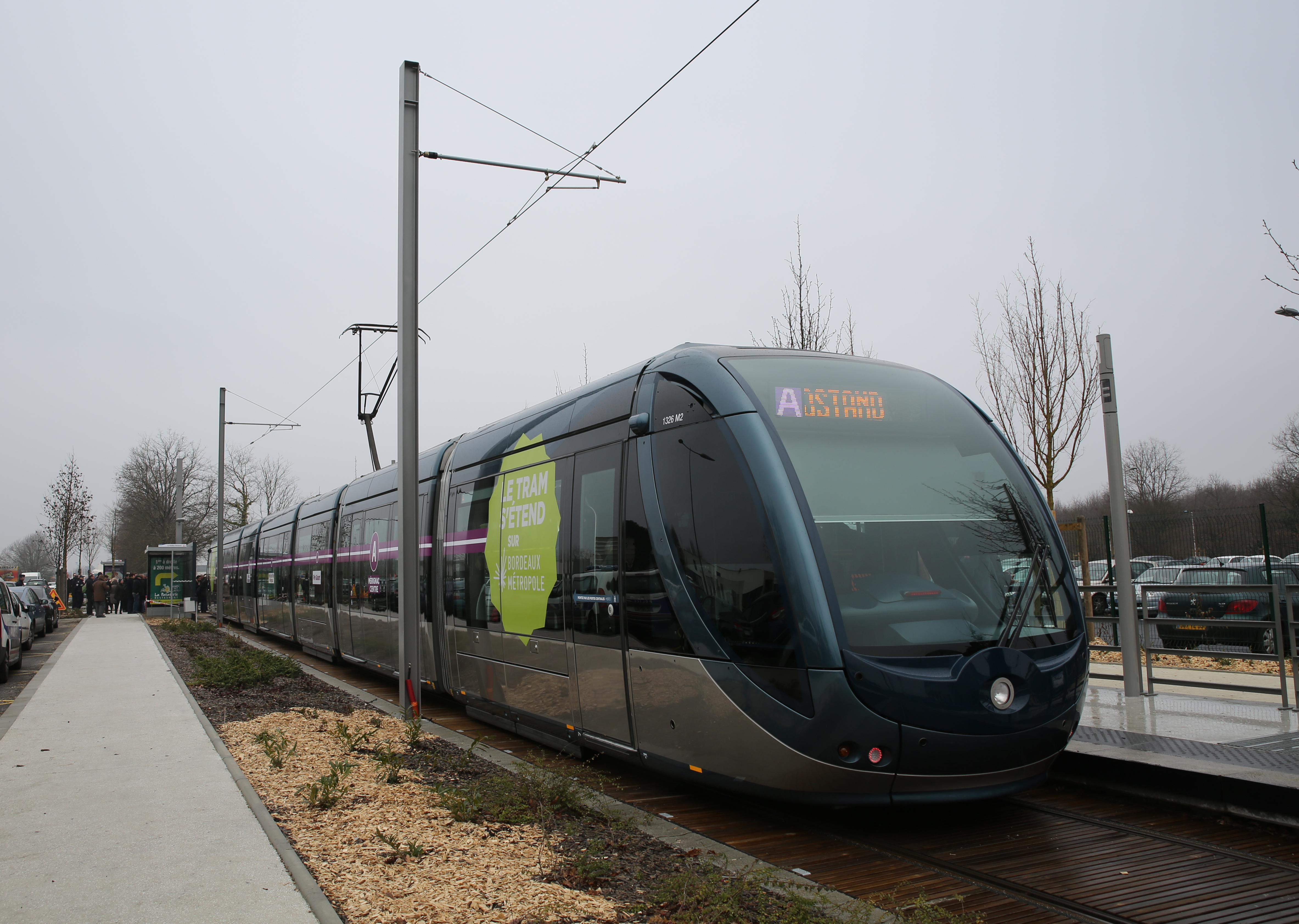 Inauguration du prolongement de la ligne A du tramway de Bordeaux jusqu'au Haillan